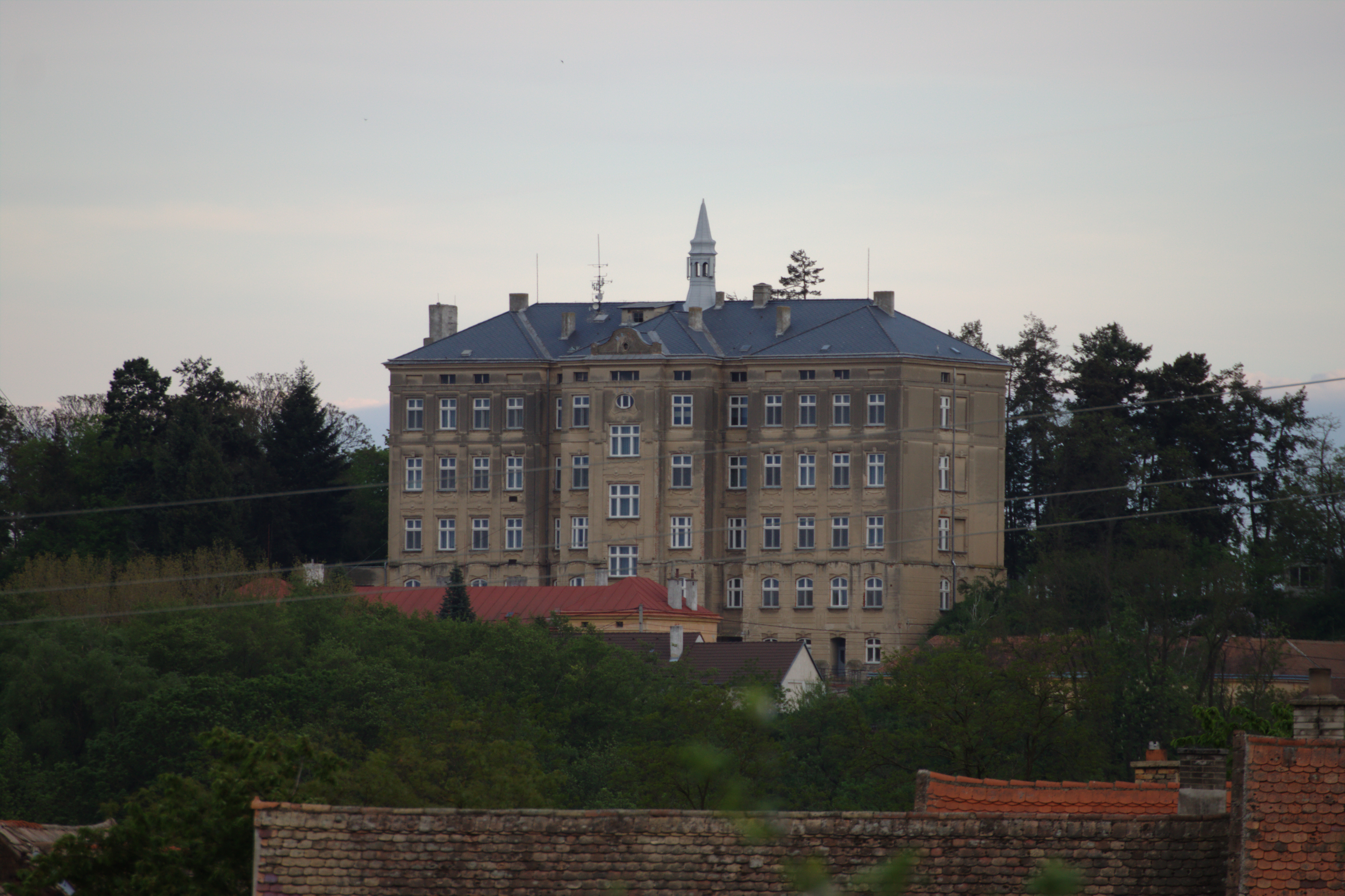 Božice čp. 188, bývalý dívčí penzionát Maria Hilf v Českých Křídlovicích, nyní domov důchodců.